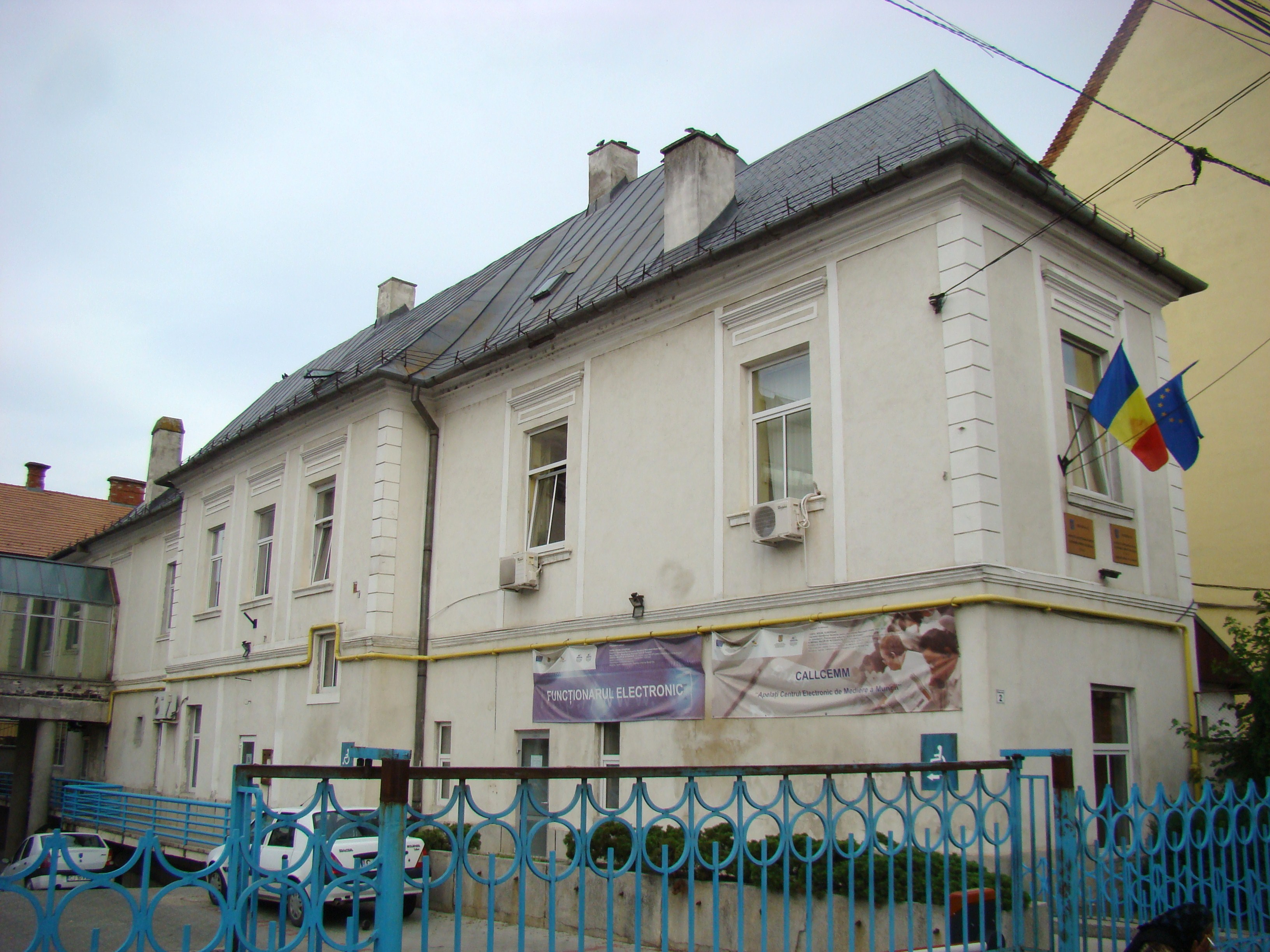 Clădire monument istoric, str. George Coșbuc, nr.2